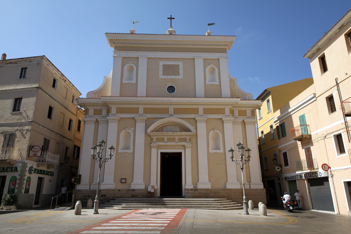 Parrocchia Santa Maria Maddalena